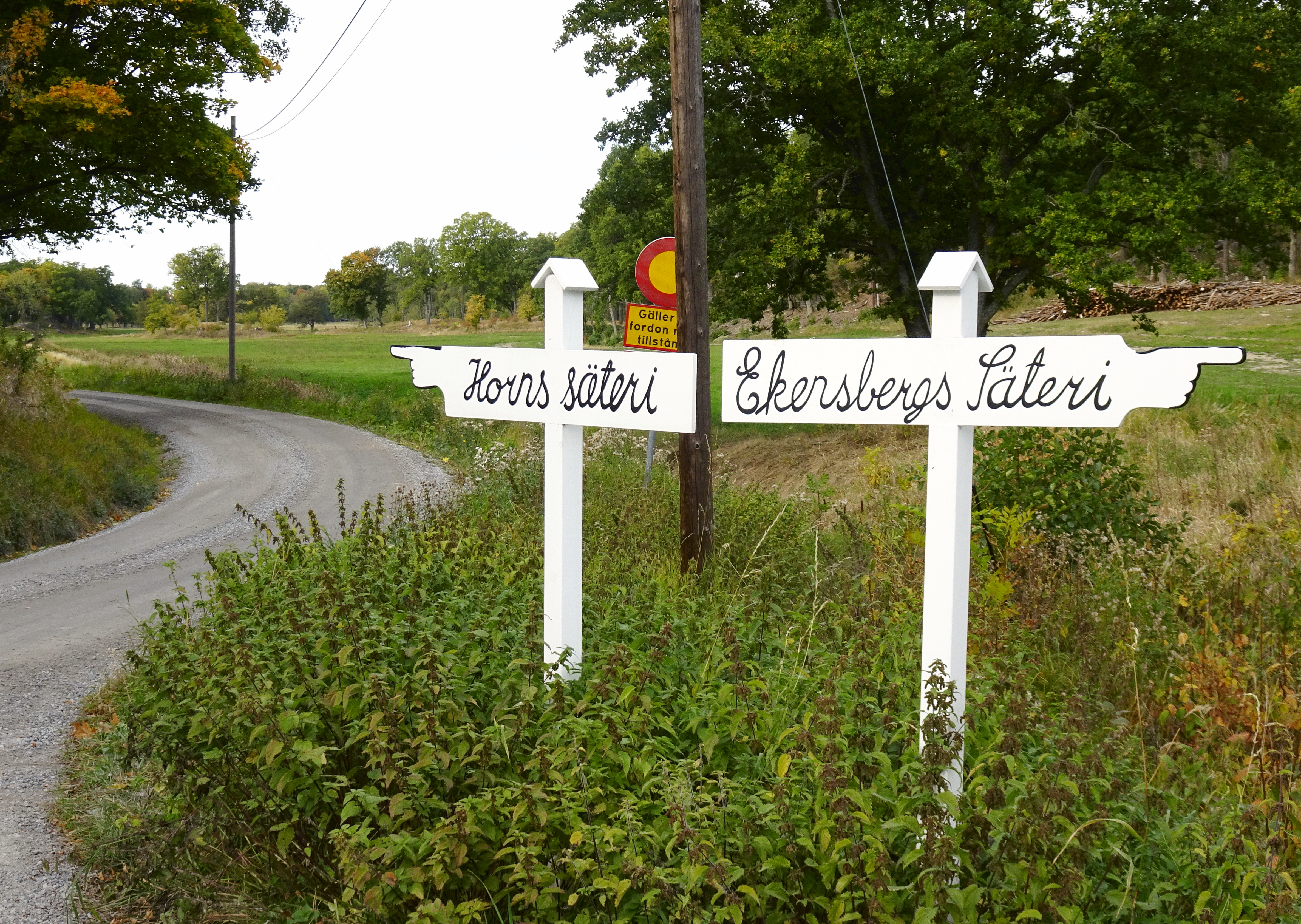 Ekensberg och Horns säteri, vädvisare